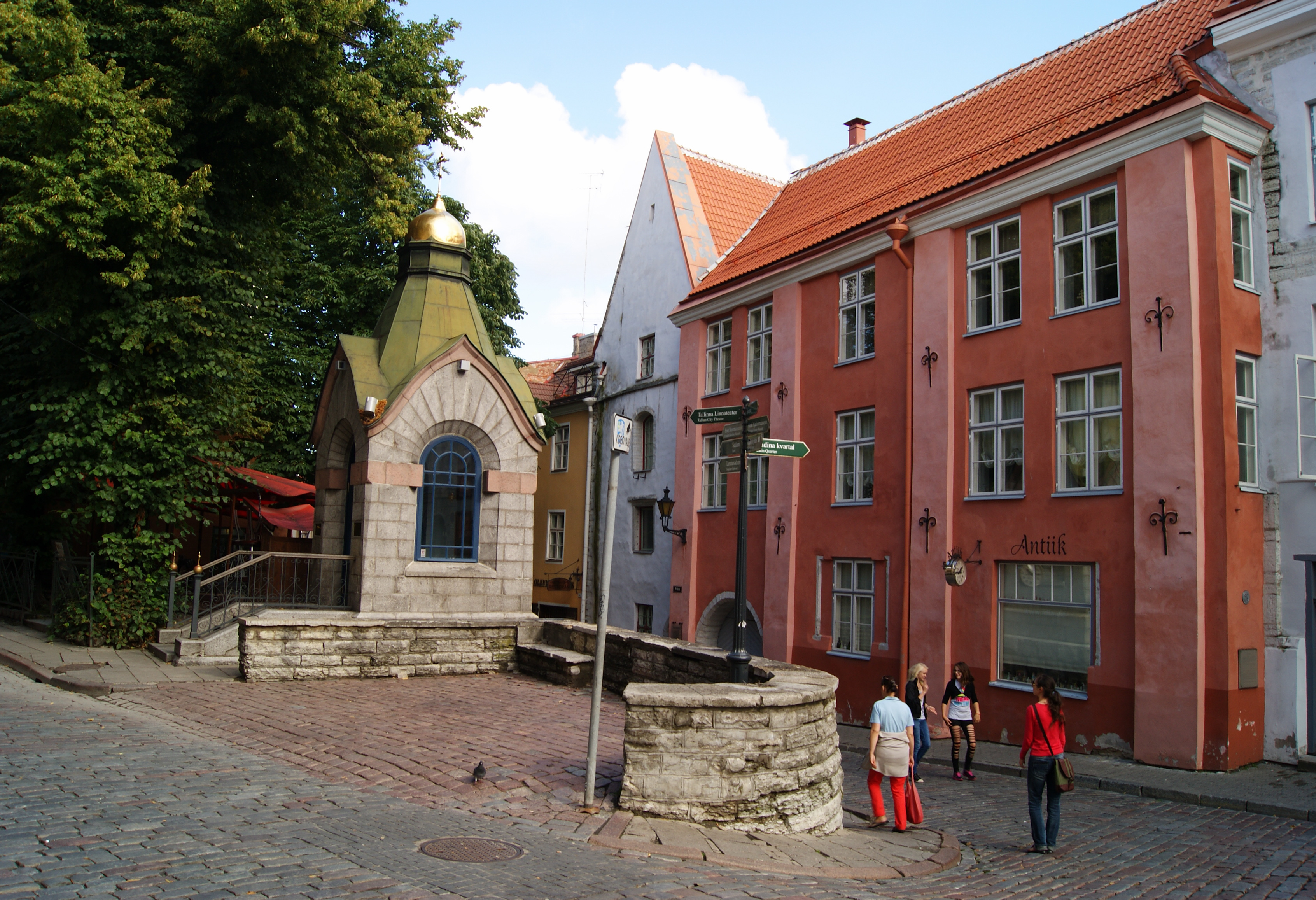 Elamu Pikk 30